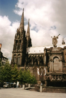 Katedra w Clermont-Ferrand przy placu de la Victoire. Przed nią pomnik papieża Urbana II. Zdjęcie zrobione we wrześniu 2001. Autor:Slawojar